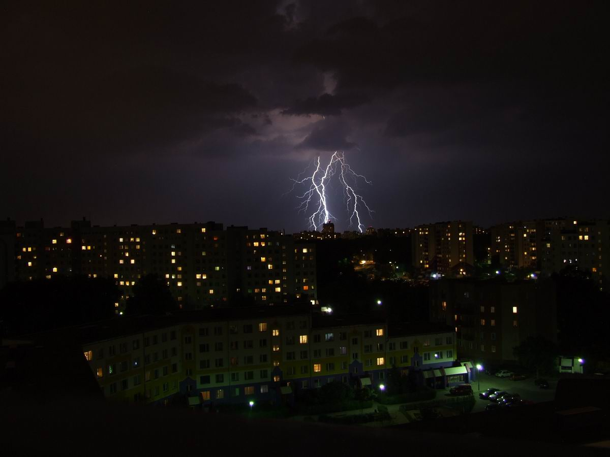 ZdjÄ™cie kozanowa w nocy